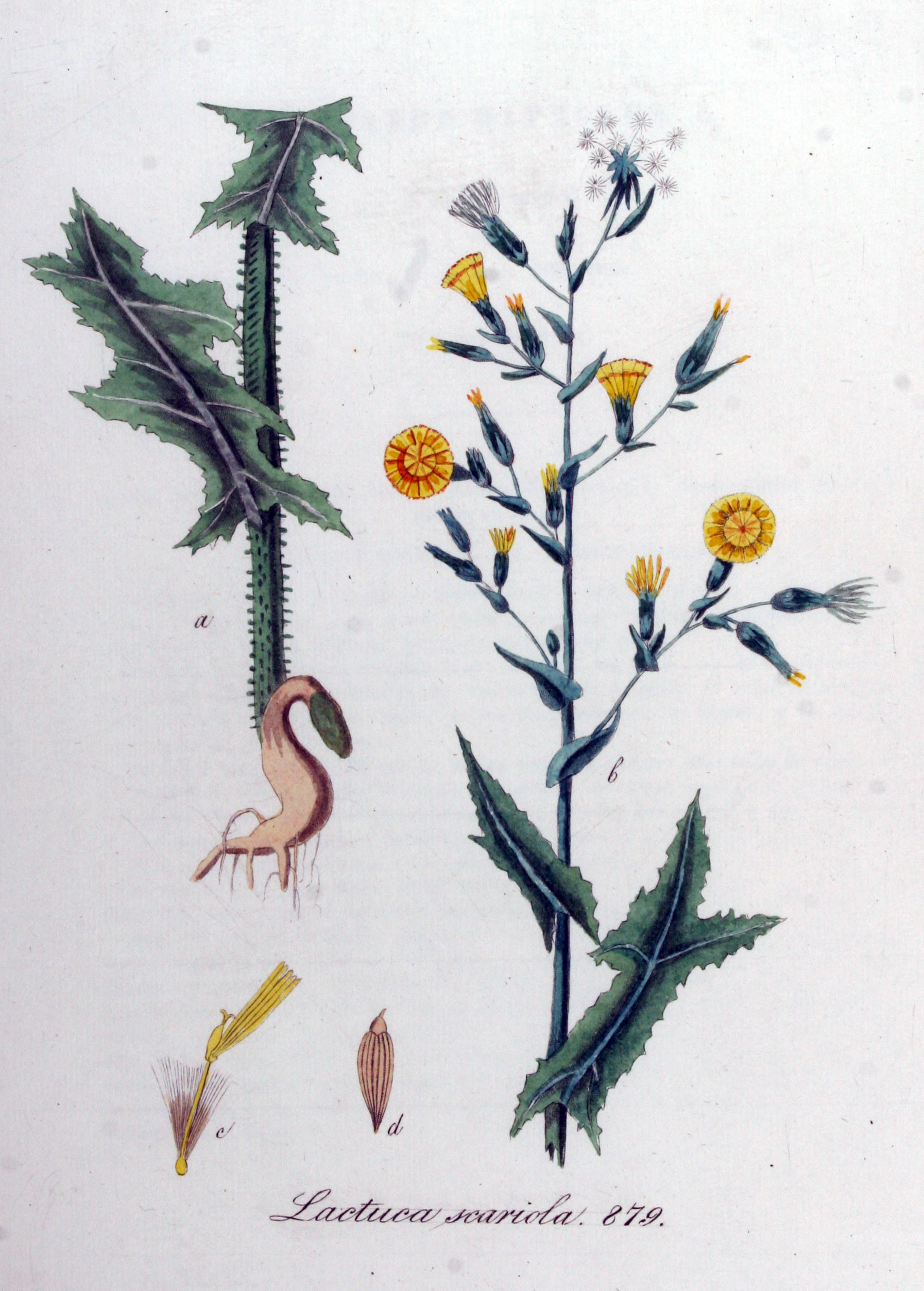 Lactuca serriola L. (Syn. Lactuca scariola L.